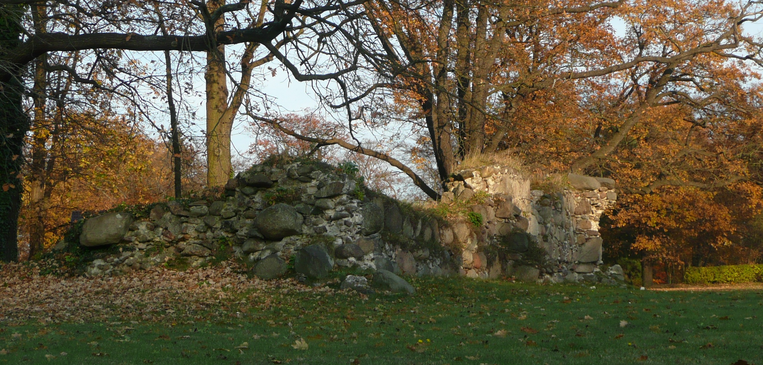 Die Kirche in Reuthen wurde vermutlich im Mittelalter erbaut und soll im Dreißigjährigen Krieg zerstört worden sein.